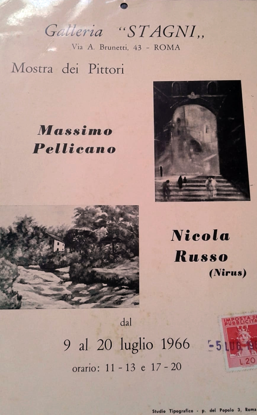 Catalogo della mostra di Massimo Pellicano alla Galleria Stagni 1966